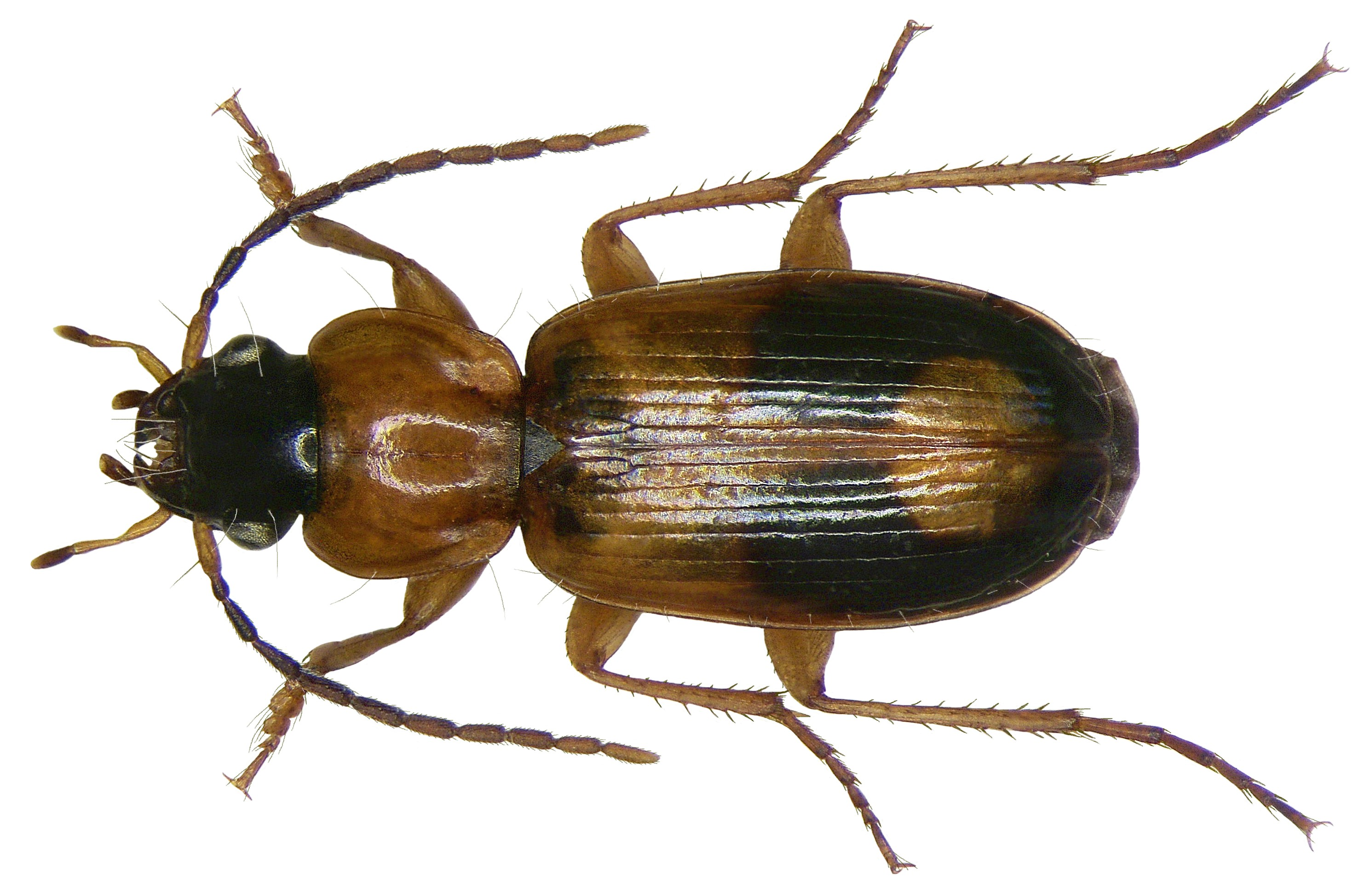 Familie: Carabidae Größe: 4,8-6,5 mm Verbreitung: Palaearktis Ökologie: in feuchten und relativ trockenen Lebensräumen Fundort: Germania, Oberfranken, Himmelkron leg.det. U.Schmidt, 1971 Foto: U.Schmidt, 2008